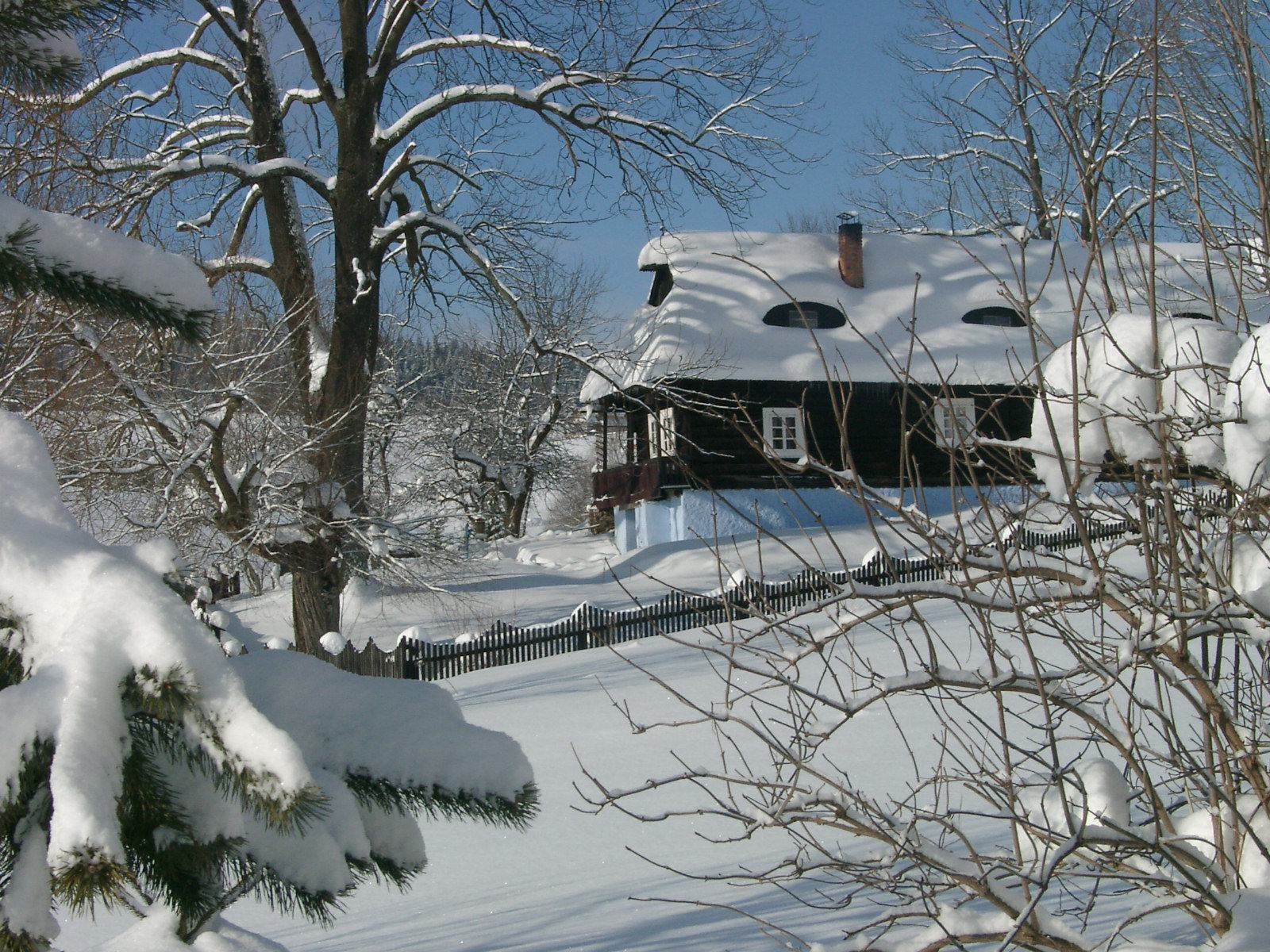 Veľké Borové, zima, chalupa zrekonštruovaná s moravskými architektonickými prvkami